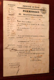 Permission de travestissement accordée par le préfet de police de Paris à Nathalie Micas le 11 octobre 1851 (photo Patrick Debétencourt)